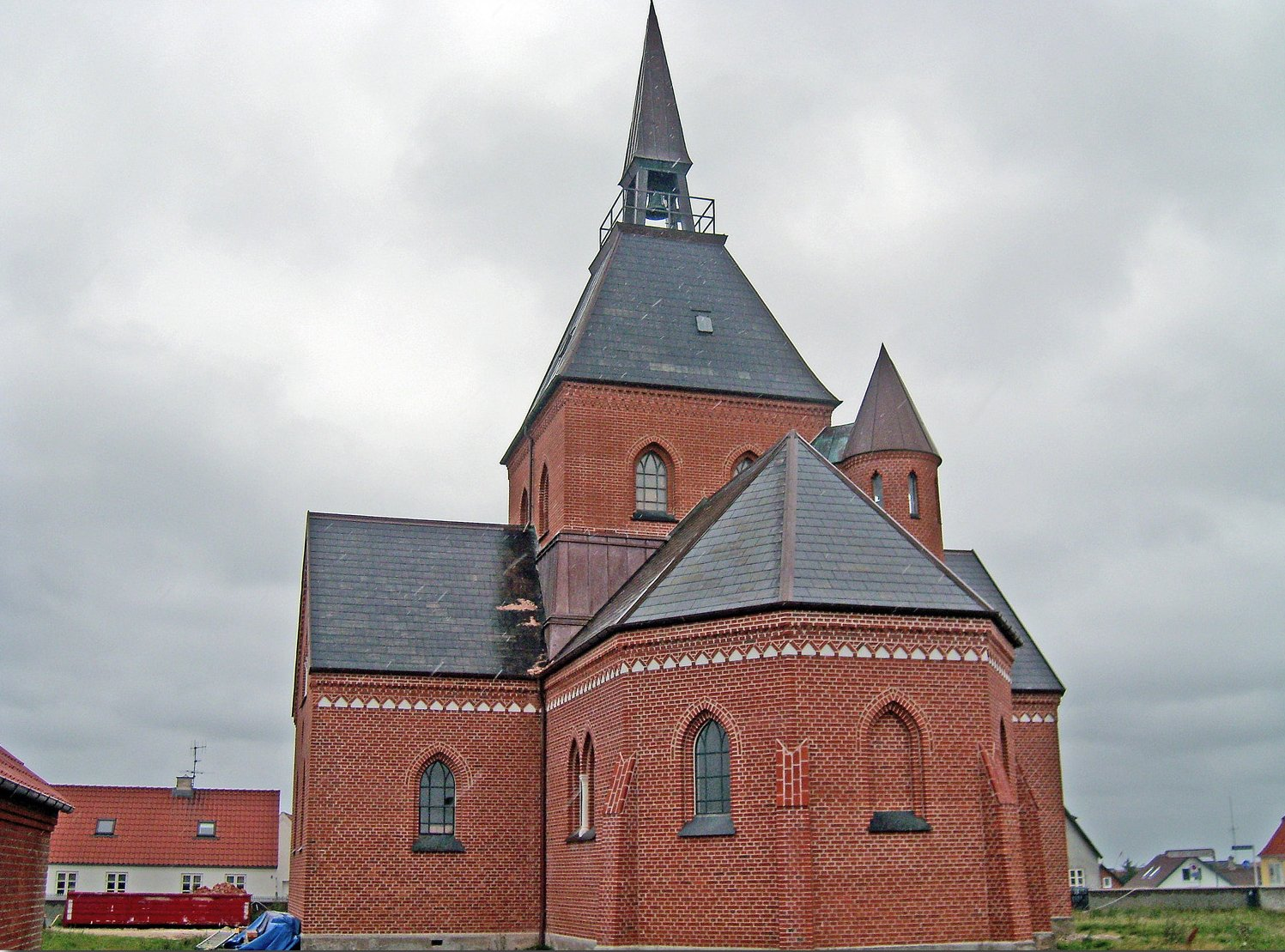 fra øst